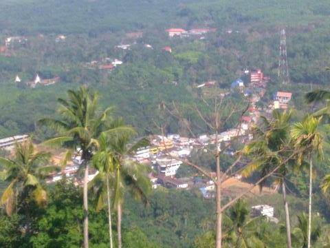 മുട്ടത്തിന്റെ ഒരു ആകാശവീക്ഷണം